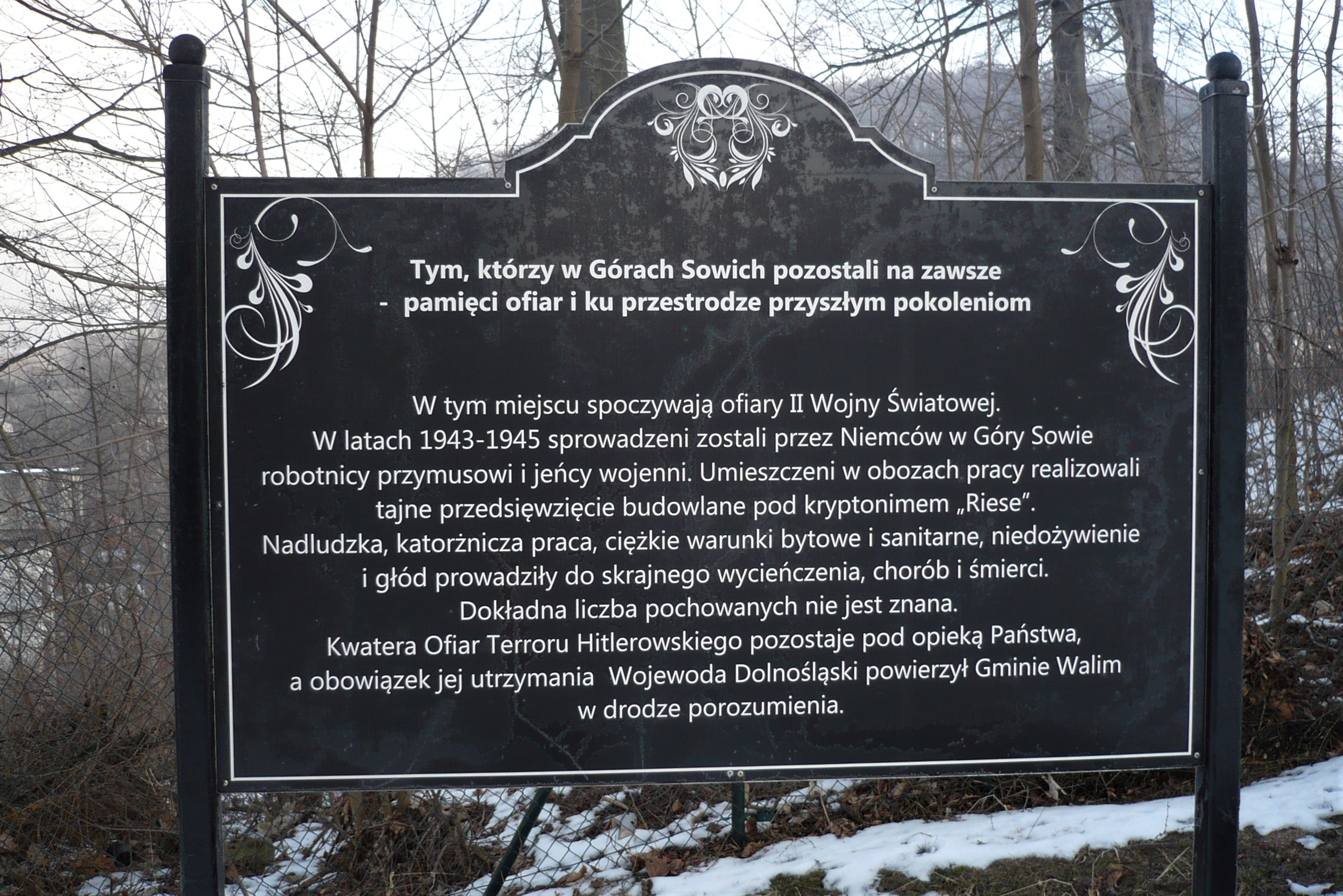 Walim